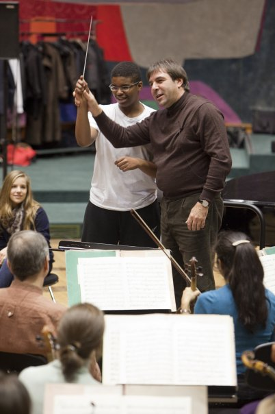 Daniele Gatti apprenant à un jeune élève les gestes rudimentaires de la direction d'orchestre. Séance Maestro! du 4 janvier 2010.